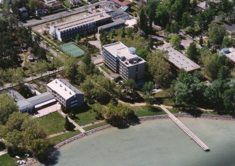 Balatonszárszó el la supro.